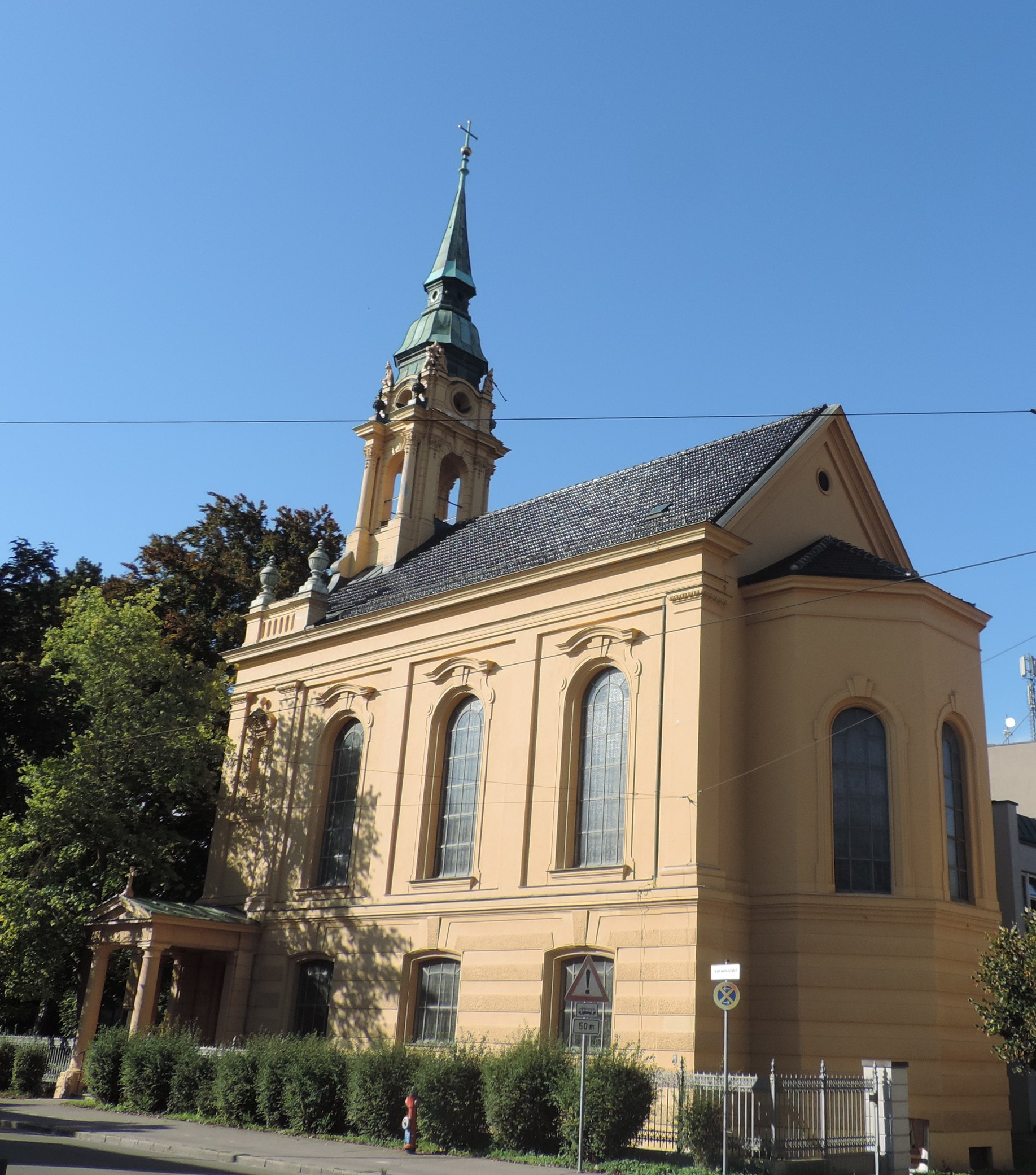 St.Johannes-Kirche Göggingen